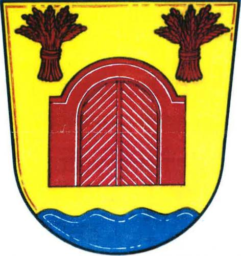 znak, Vráto, okres České Budějovice